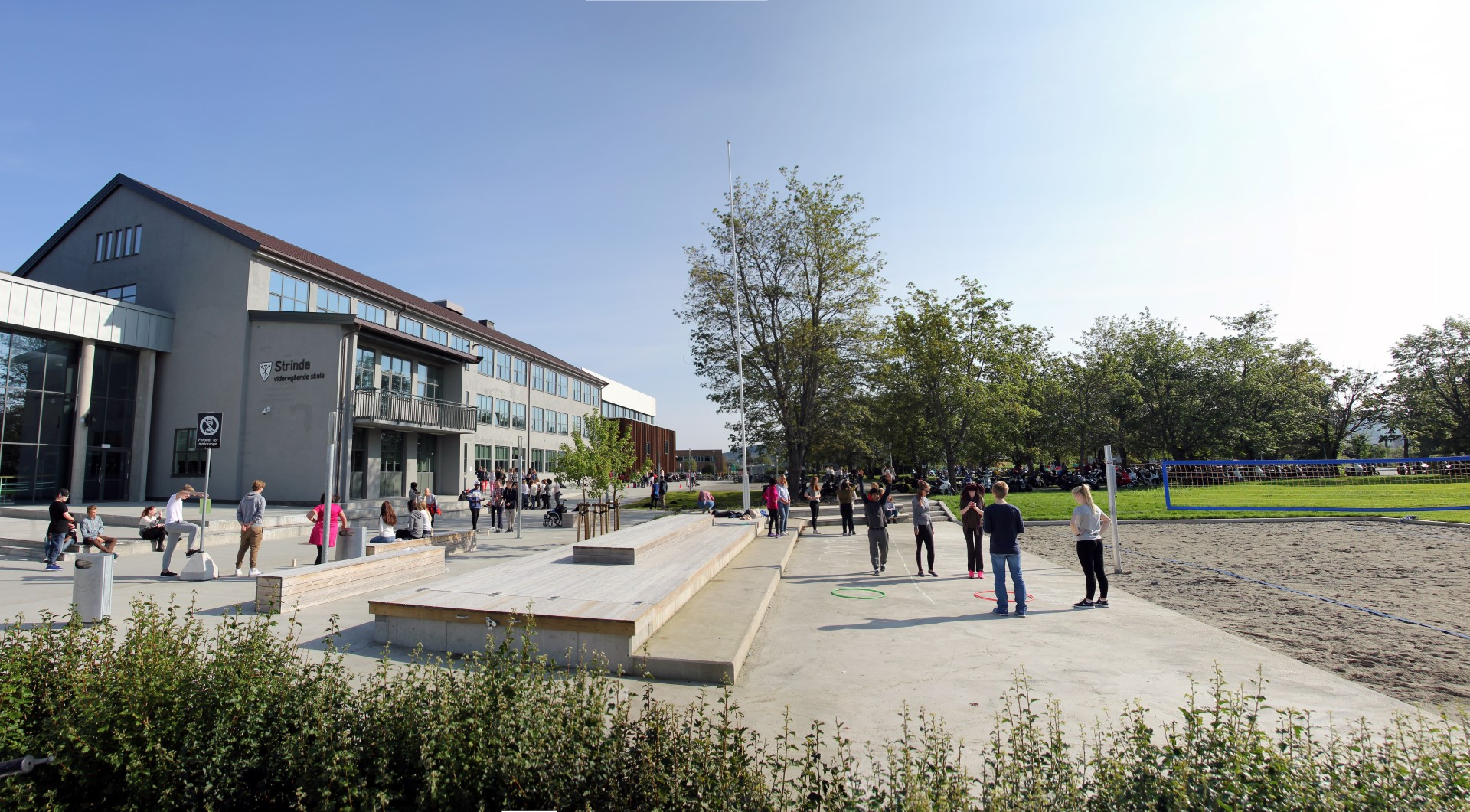 Strinda vgs.